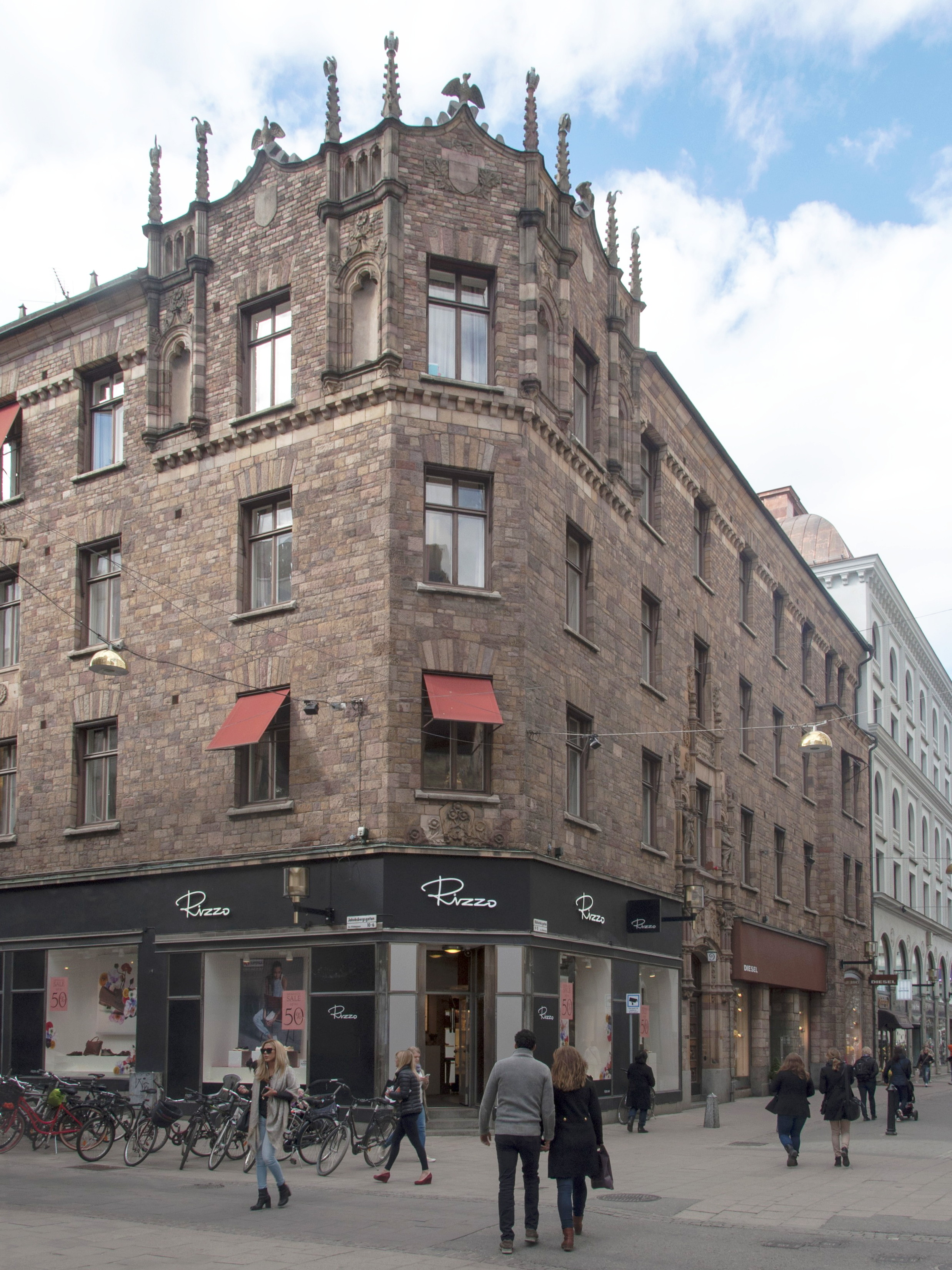 Vildmannen 7, Biblioteksgatan 9, Jakobsbergsgatan 6, Nybyggnadsår 1895 - 1897 Burman & Co (Byggherre) Carl Gustaf Ohlsson (Byggmästare) Erik Josephson (Arkitekt) - Fasader Gottfried Karlsson (Arkitekt) - Planer